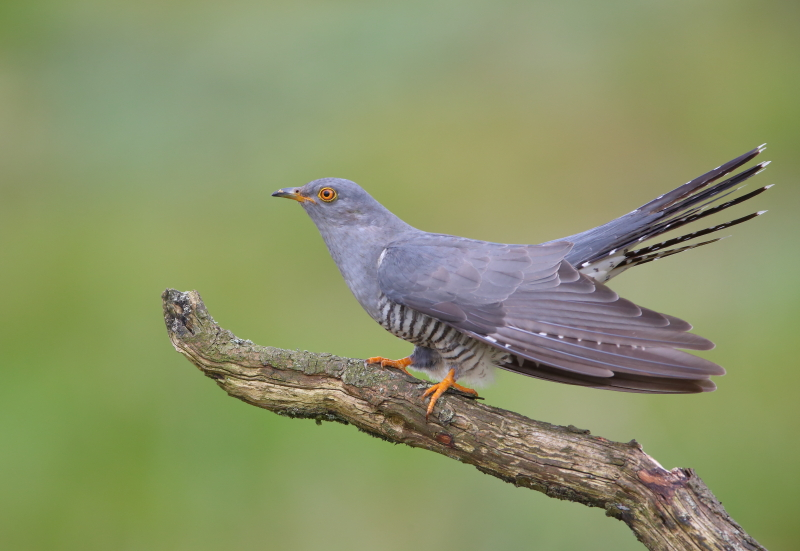 Cuckoo